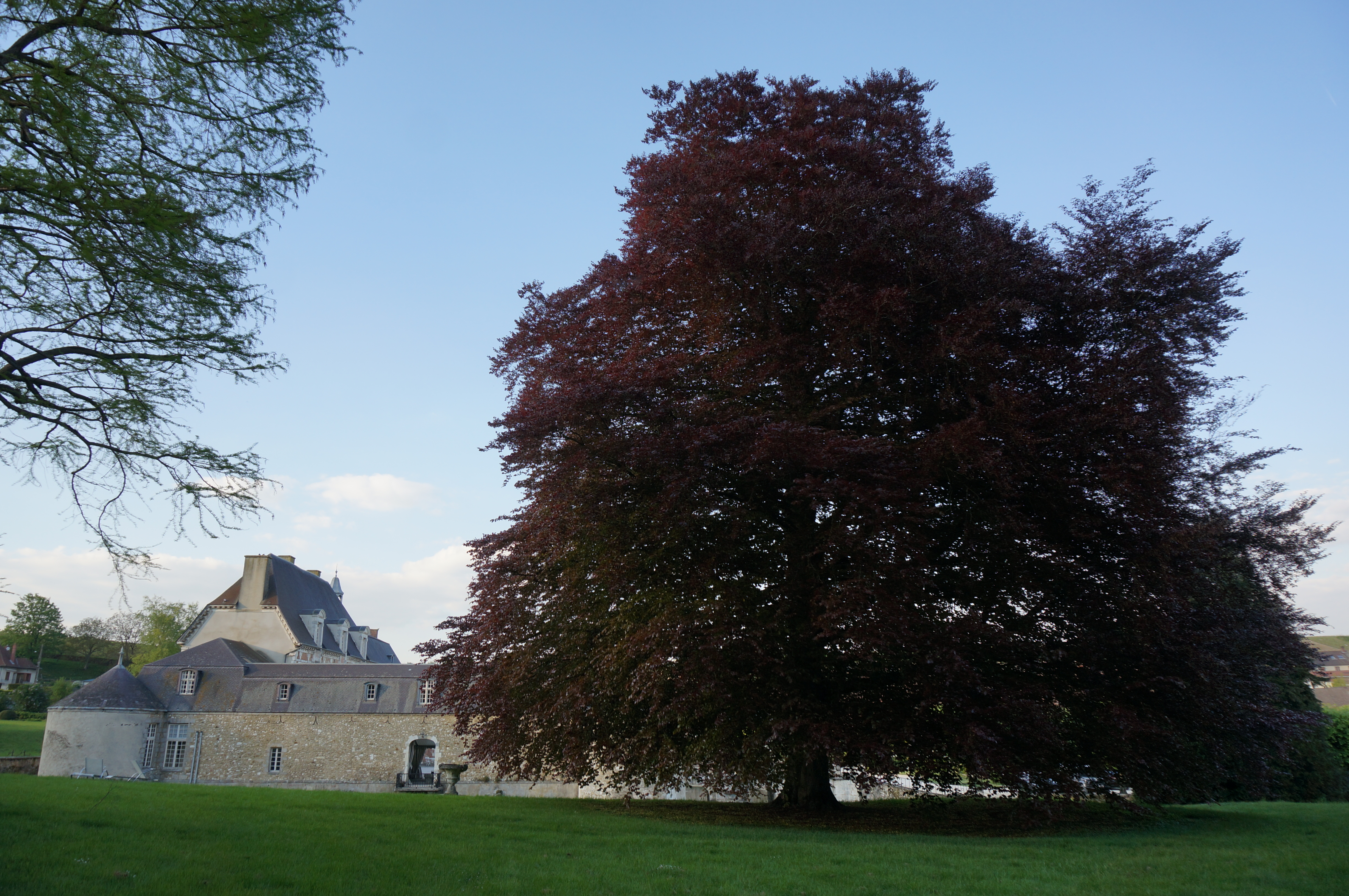 au Château d'Étoges.